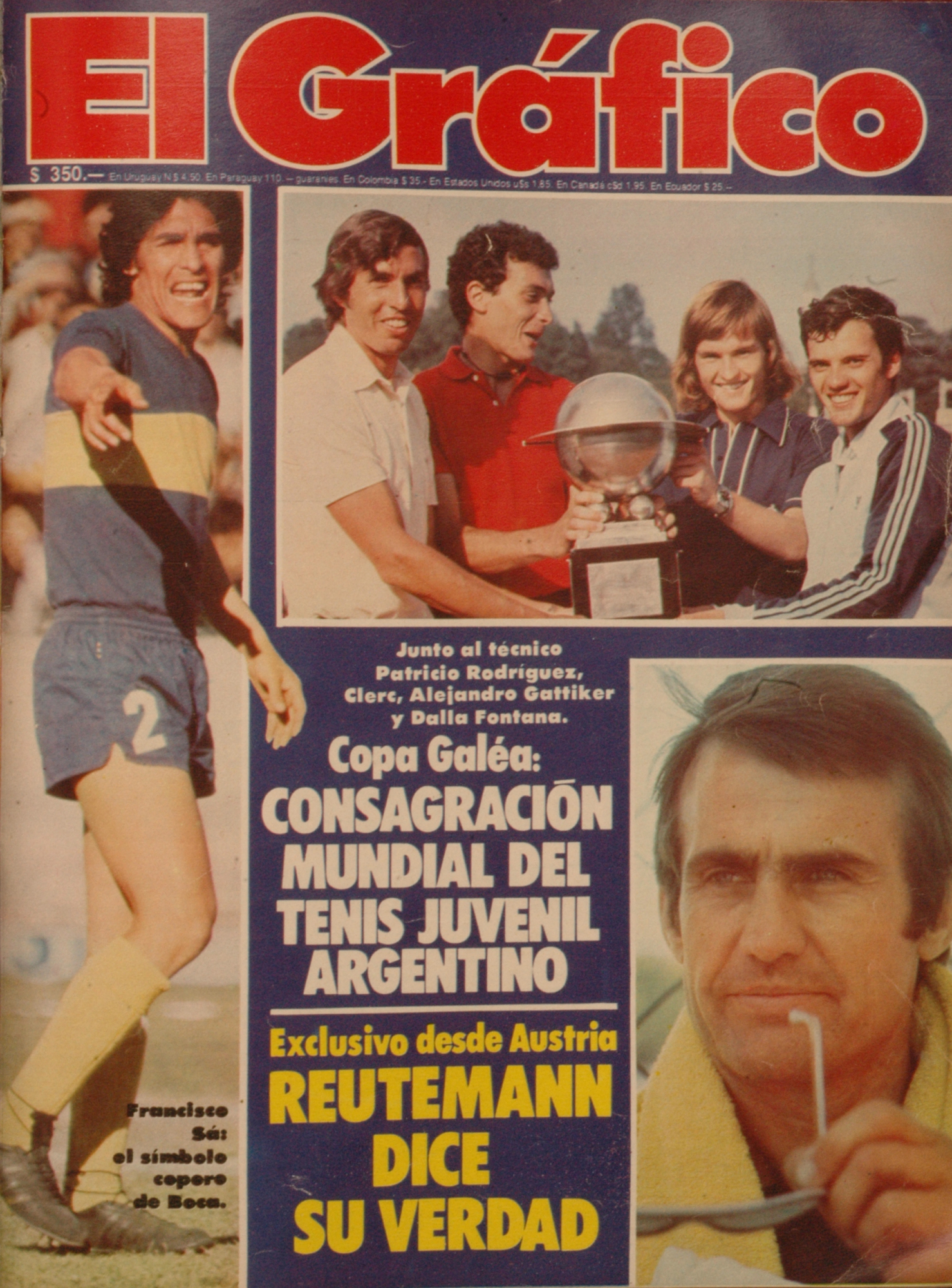 El Grafico del 09 de Agosto de 1977. Edicion 3018.